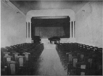 O Auditório Tasso Corrêa, o primeiro auditório do Instituto de Artes da Ufrgs